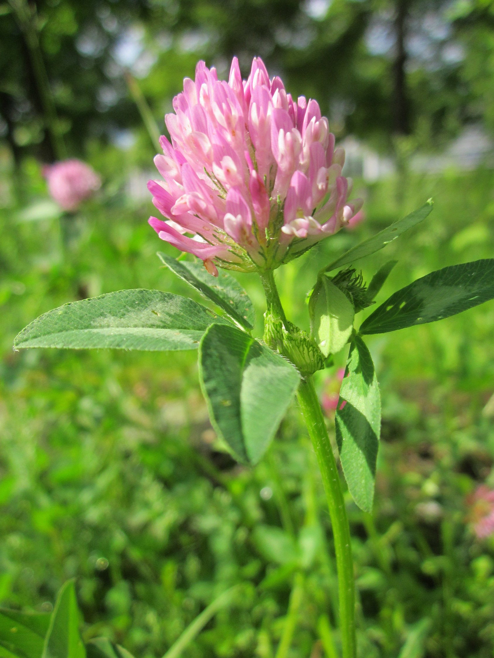 Wiesen-Klee (Trifolium pratense) im Bürgerpark Saarbrücken